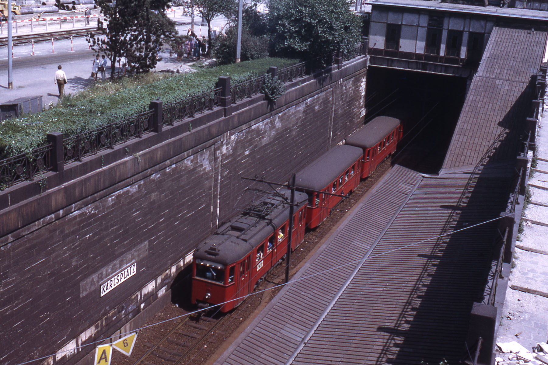 Stadtbahnstation Karlsplatz vor dem U-Bahn-Bau.